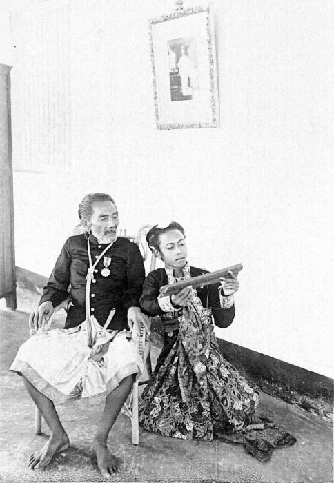 Repronegatief. Heer Djilantik en Heer Bagoes Djilantik, Karang Asem, Oost-Bali